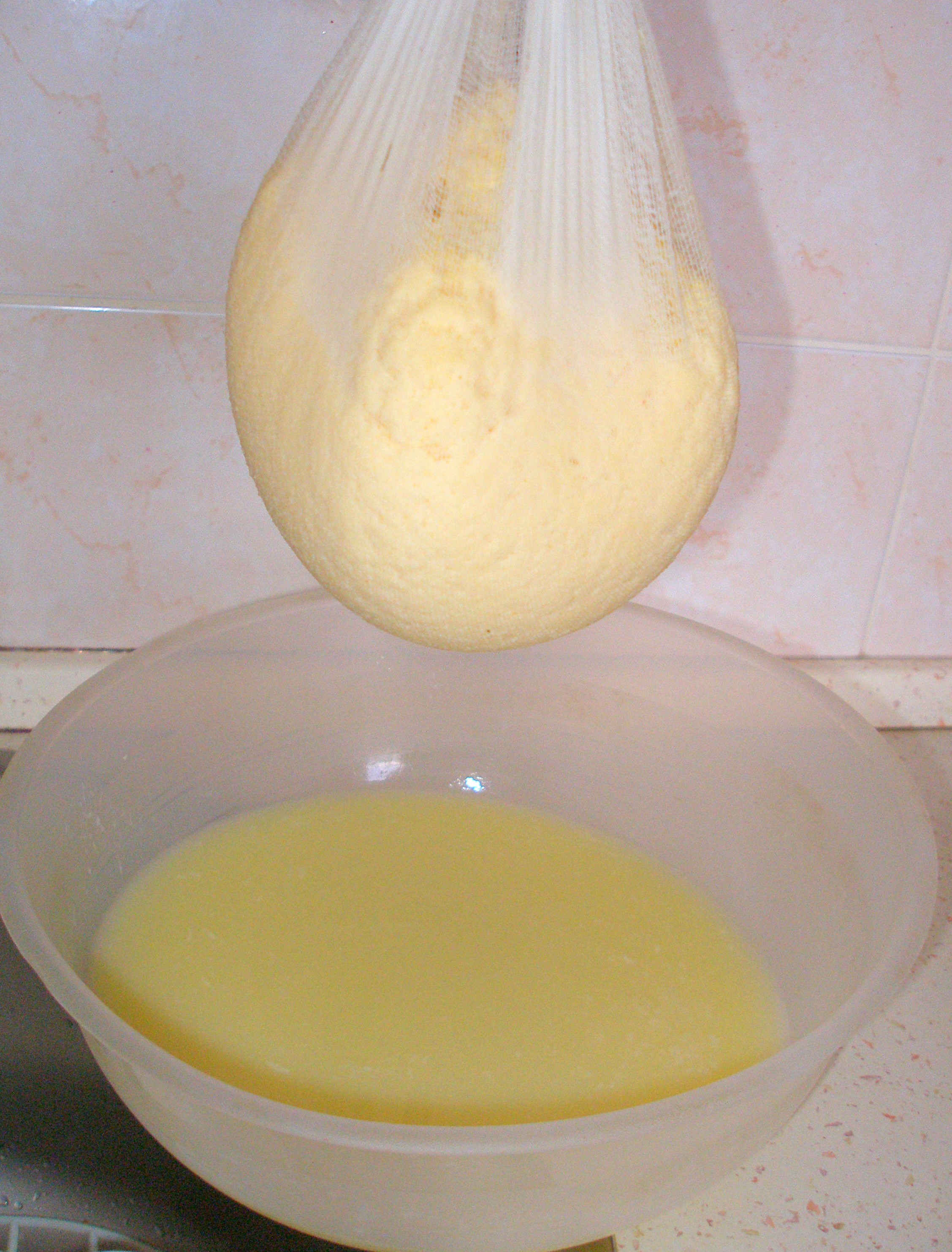 Veľkonočné sviatky 2012. Biela sobota, príprava veľkonočných jedál. Hrudka syra vyrobeného doma z kravského mlieka a slepačích vajíčok. Na Šariši nazývaný "syrek". V miske je syrovatka.